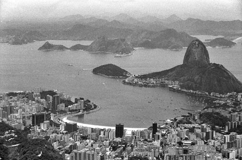 Baia de Guanabara, Rio de Janeiro, Brasil, visto do alto do Corcovado